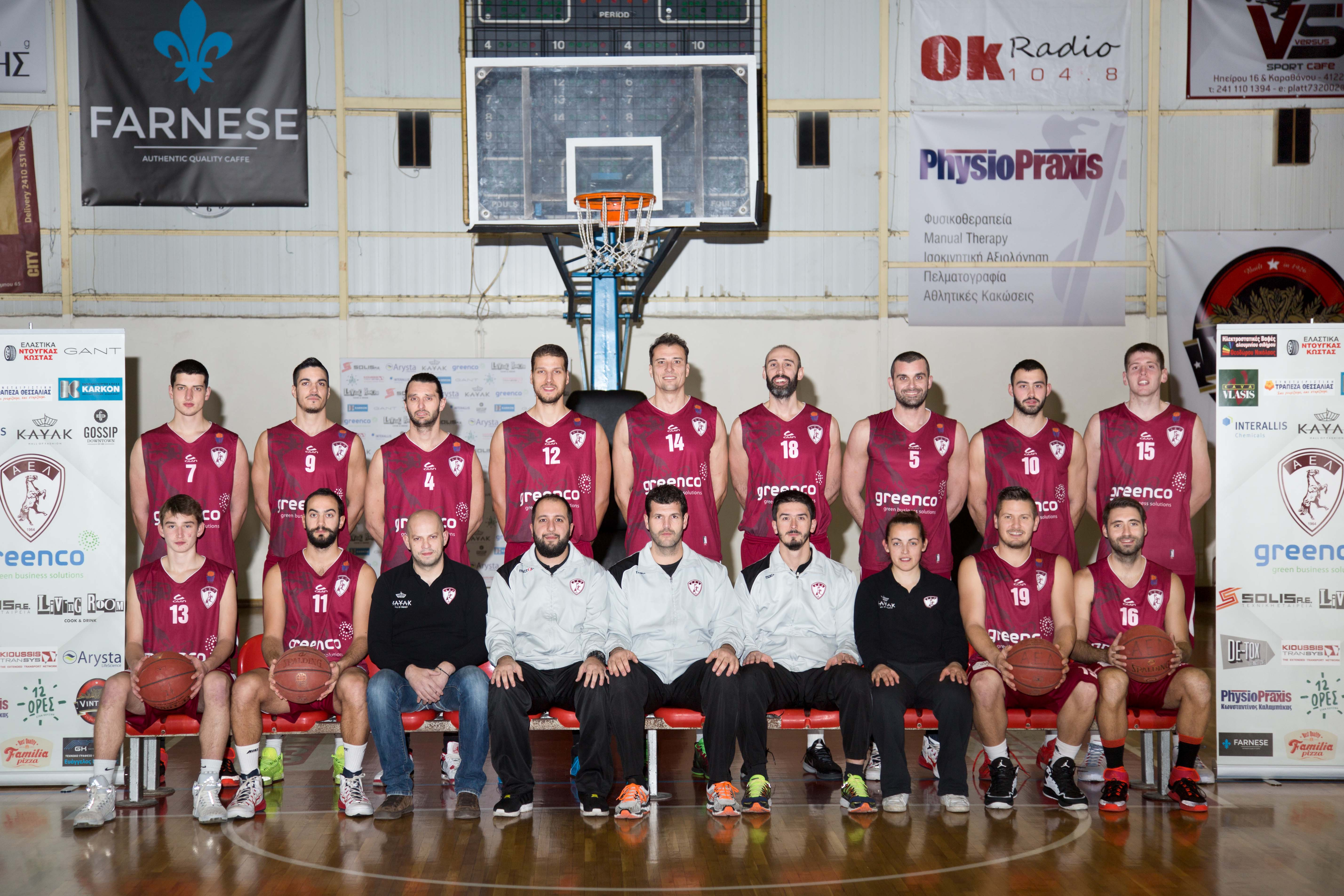 AEL Basket 2015-2016 Roster